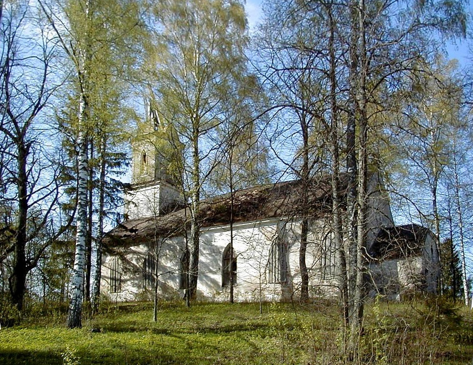 Liepkalnes baznīca 2003-05-10